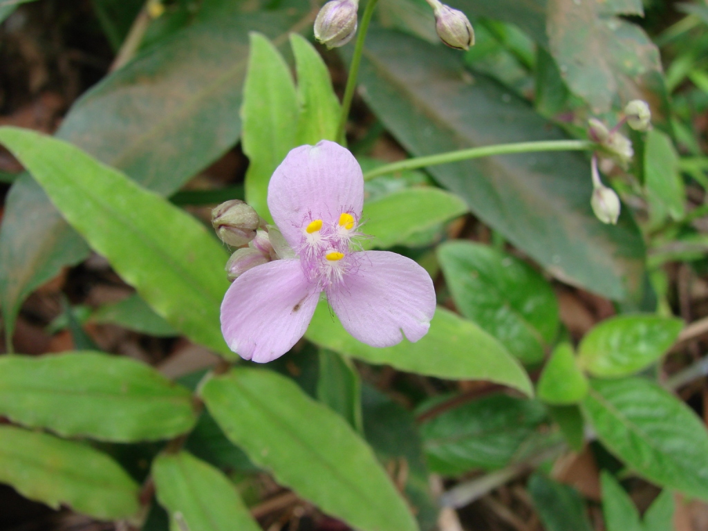 Tripogandra diuretica - COMMELINACEAE Parque Nacional de Brasília - Distrito Federal - Brasil.